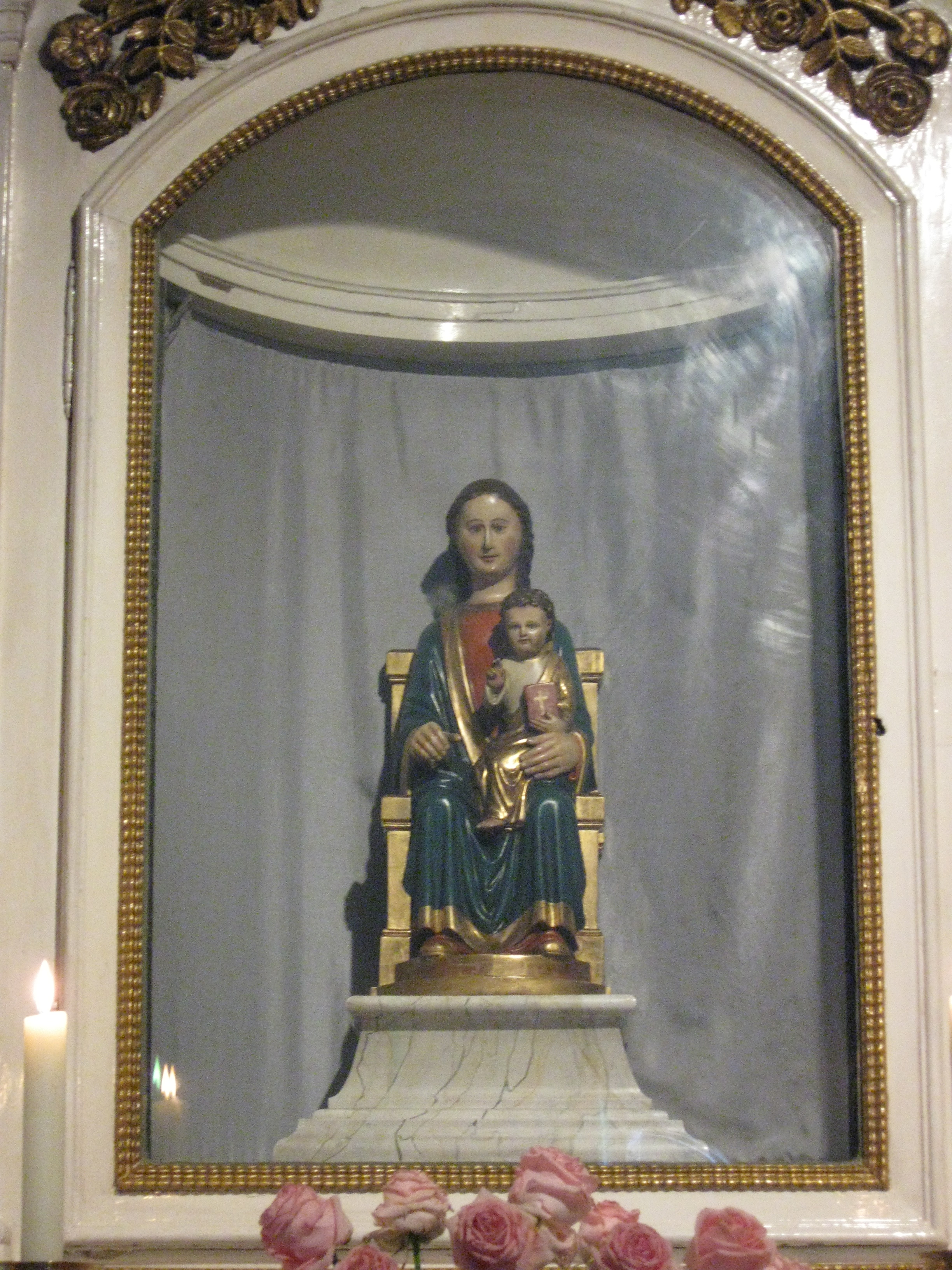 Marienbild von Eggerode, hier unbekrönt (in der Fastenzeit werden die von den Figuren sonst getragenen Schmuckkronen entfernt)